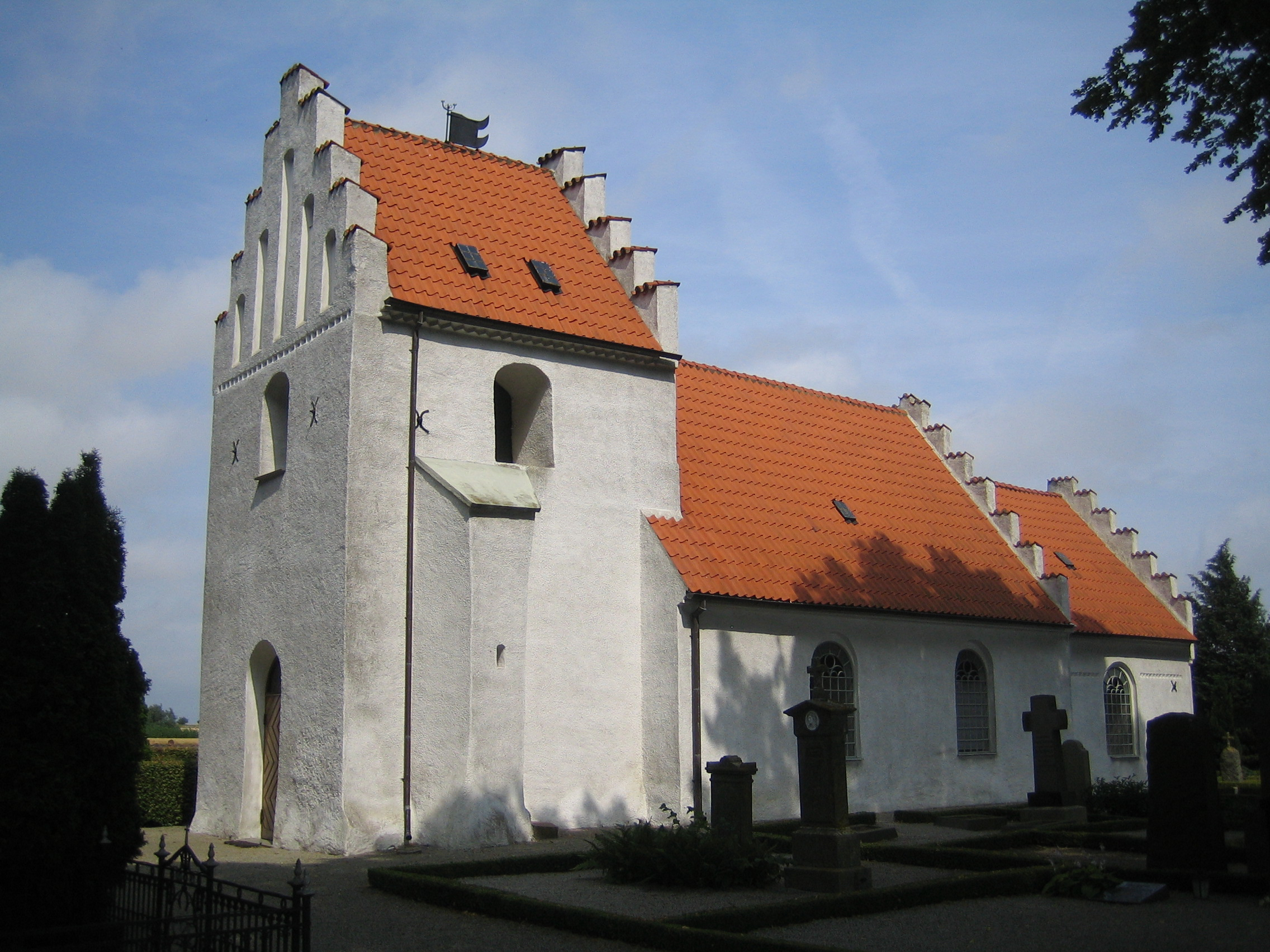 Dalköpinge kyrka.